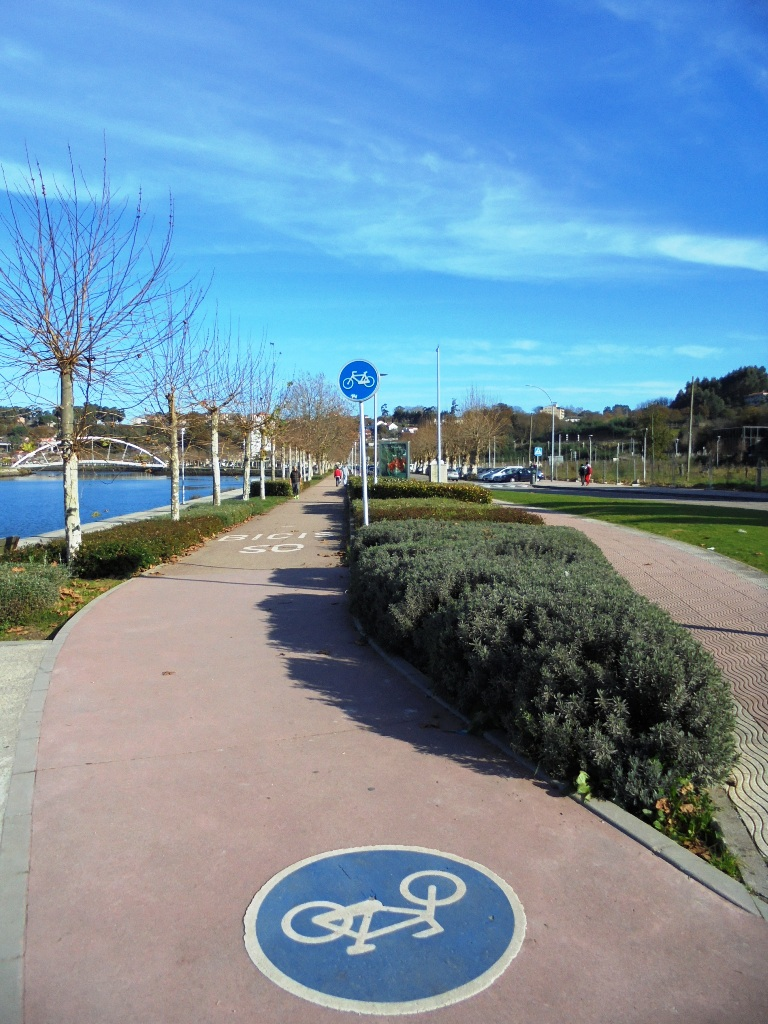 Pontevedra capital Carril Bici Paseo del Lérez